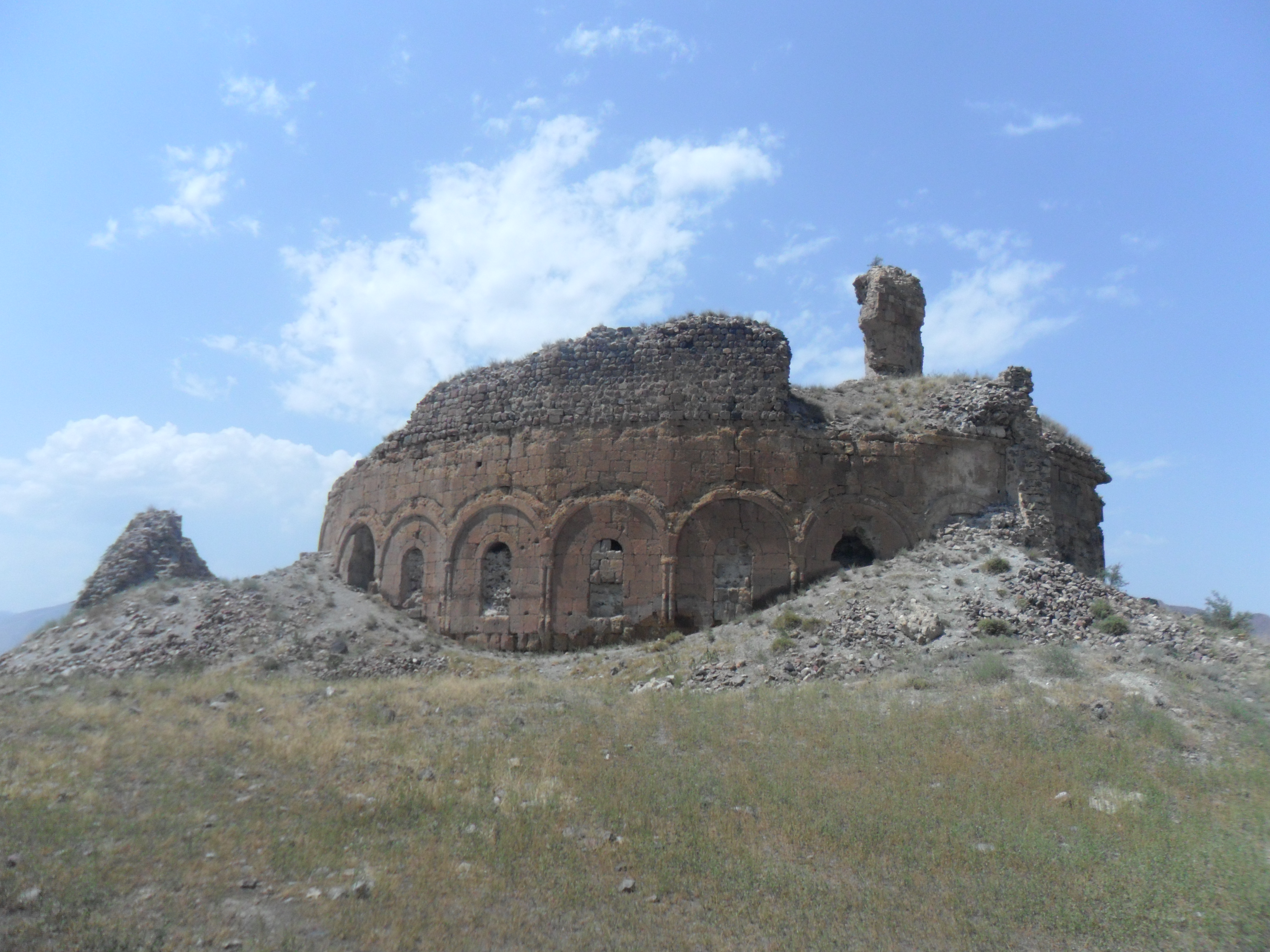 Բանակի 7-րդ դարի եկեղեցի